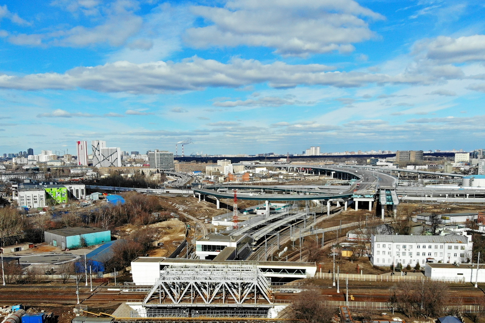 Строительство путепровода через МЦК в районе ул. Пруд Ключики (С. Собянин, М. Хуснуллин; 28.03.2019)